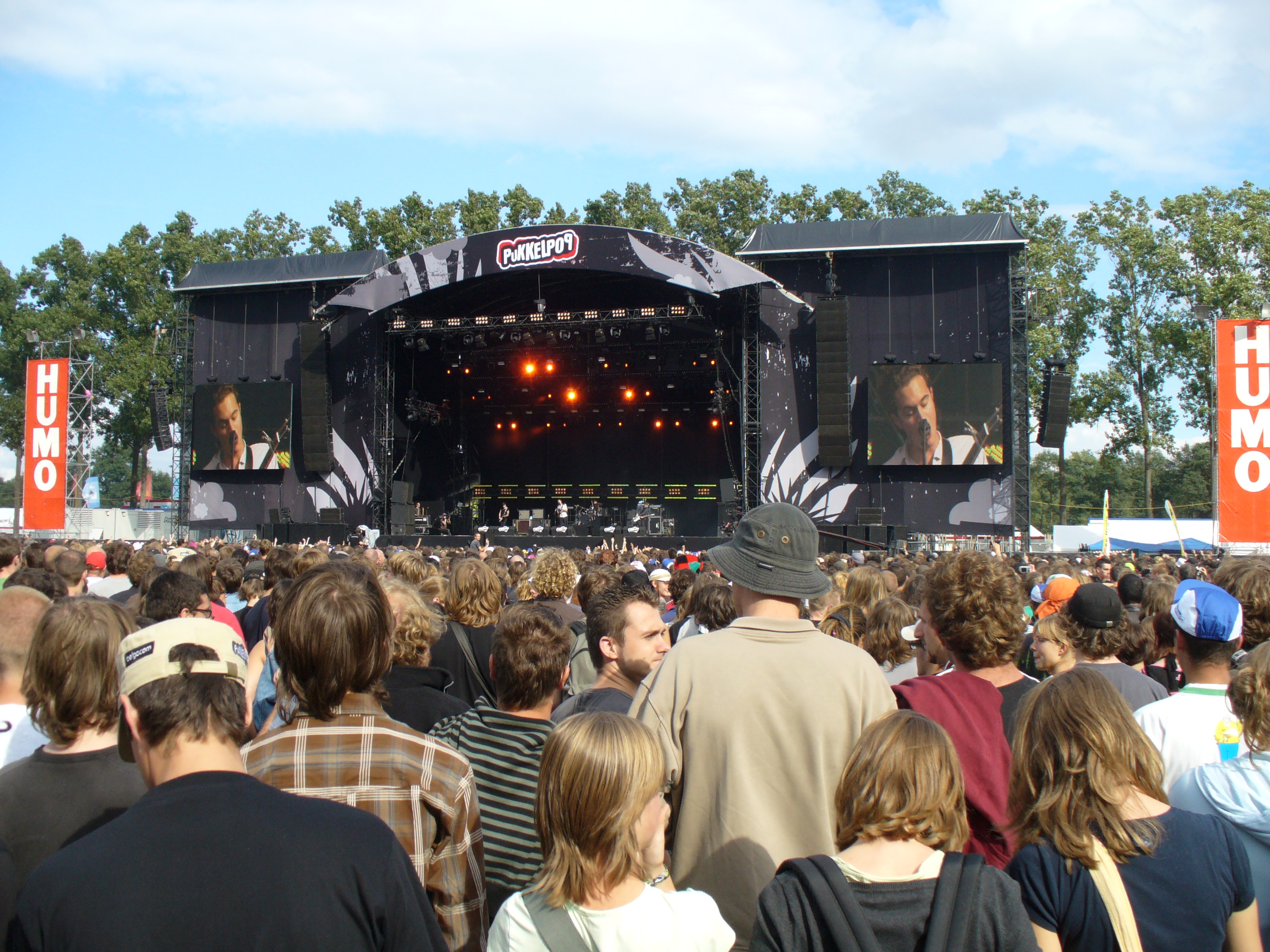 Editors @ Pukkelpop 2007